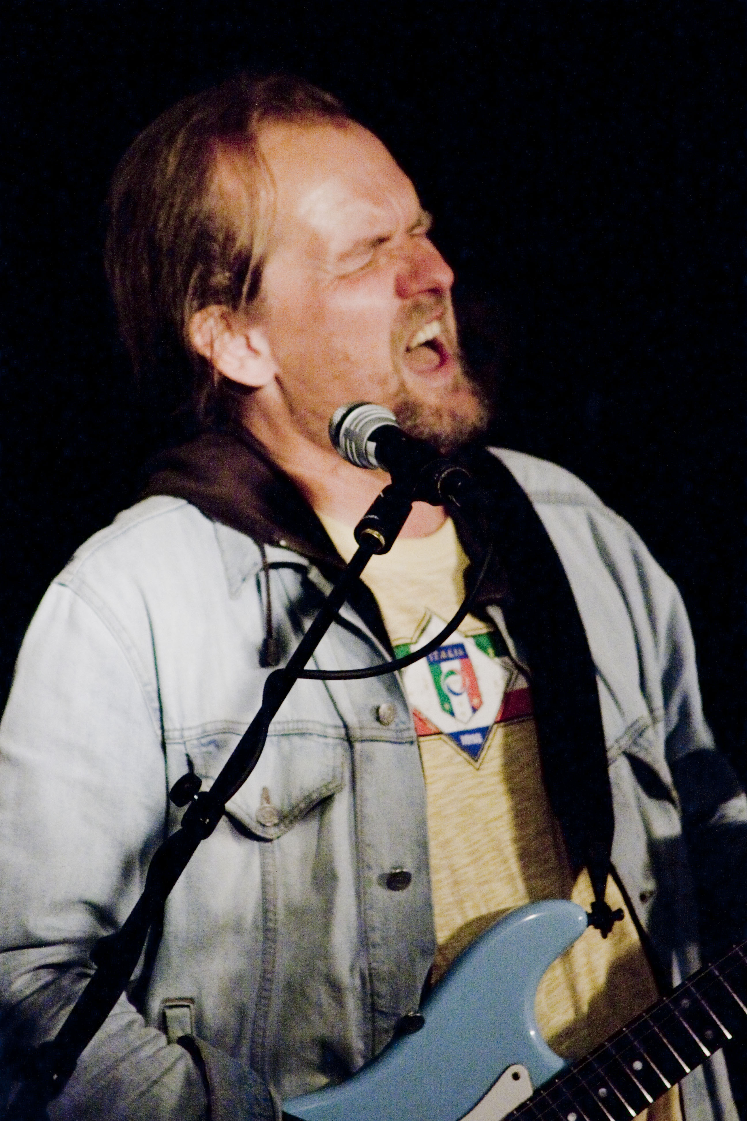 Carla Jonsson på scen under en konsert med Eldkvarn i Trollhättan, 2008